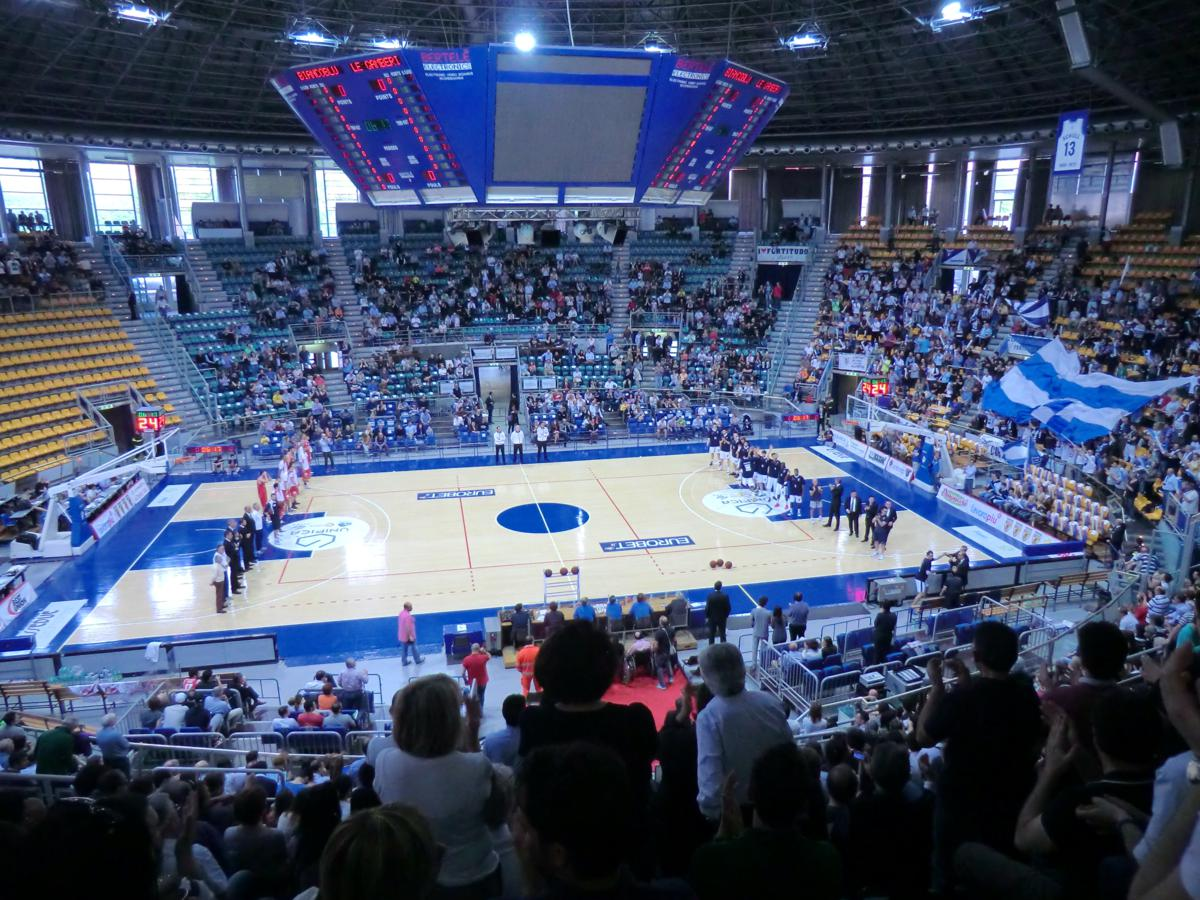 Alcune immagini scattate in occasione dell'incontro di LegaDue tra Bologna e Forlì al PalaDozza di Bologna.